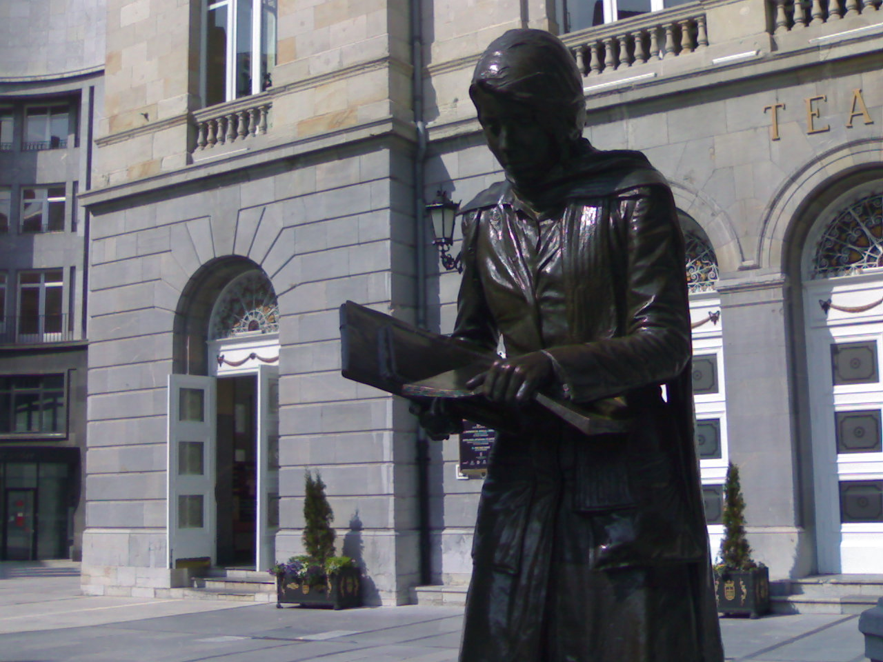 A woman in Oviedo